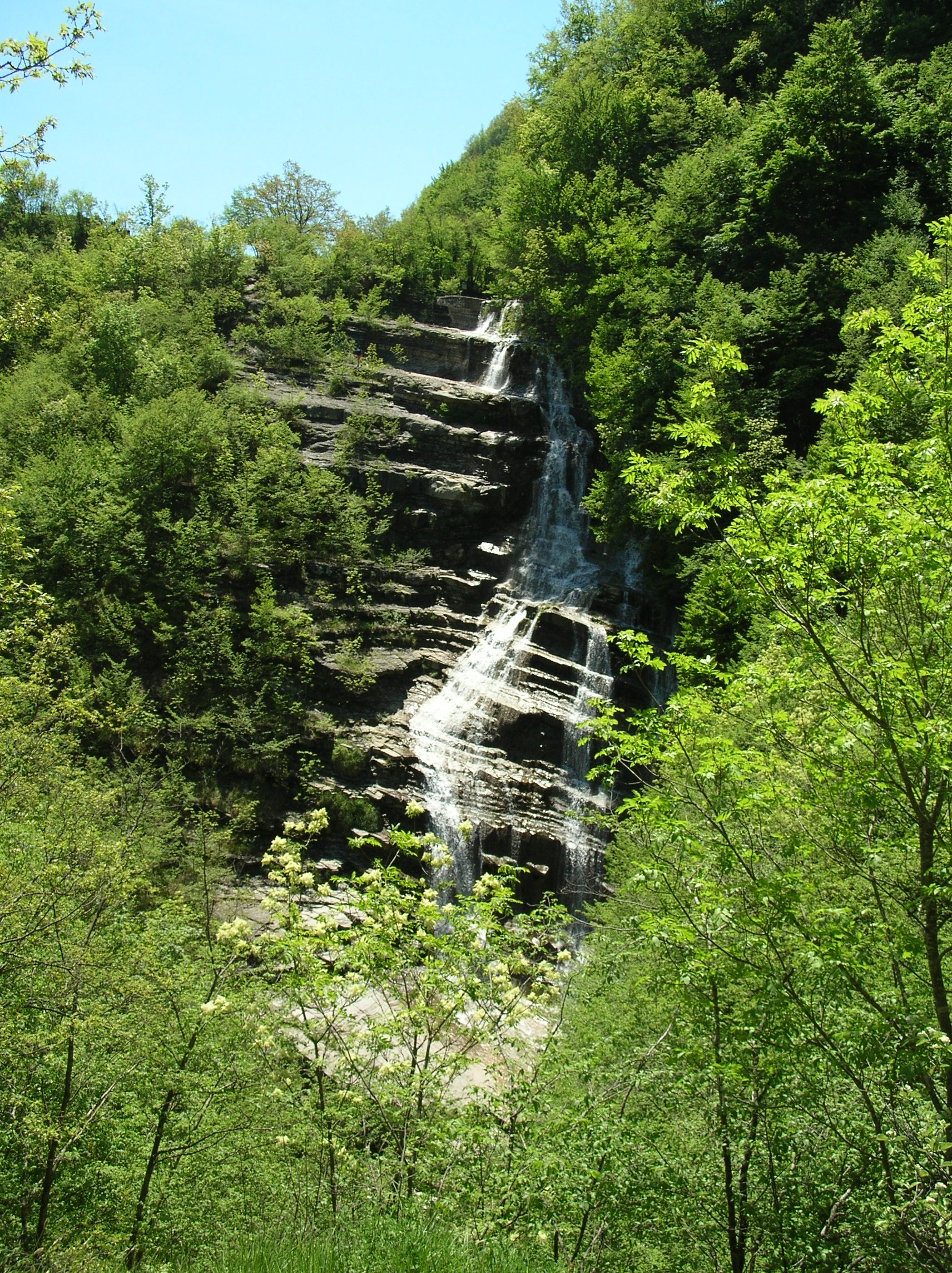 Federica Bardi, scatto dell'autore, vista frontale della Cascata dell'Acquacheta, caricata da utente lineagoticafight autorizzato dall'autrice